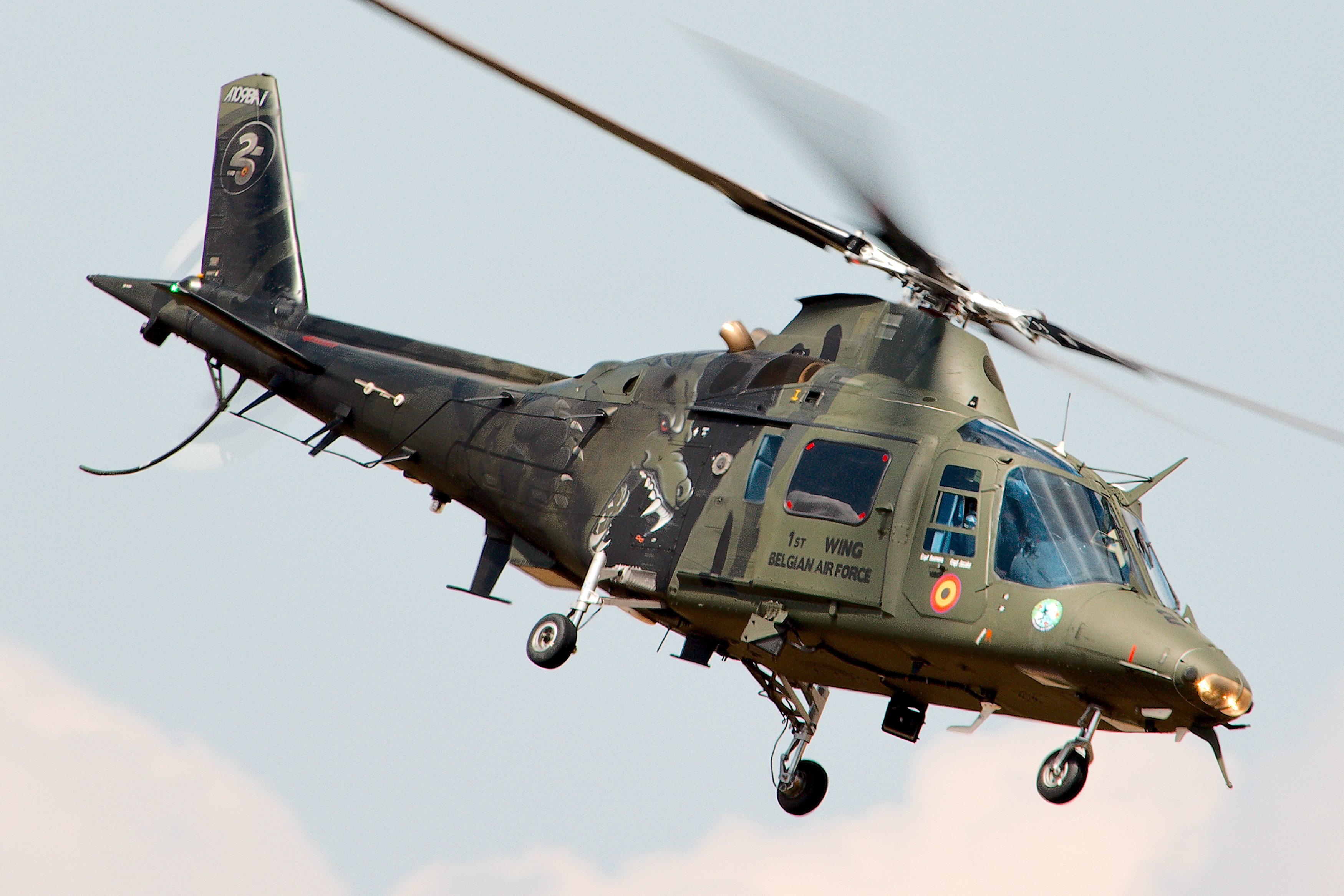 A109 - RIAT 2018